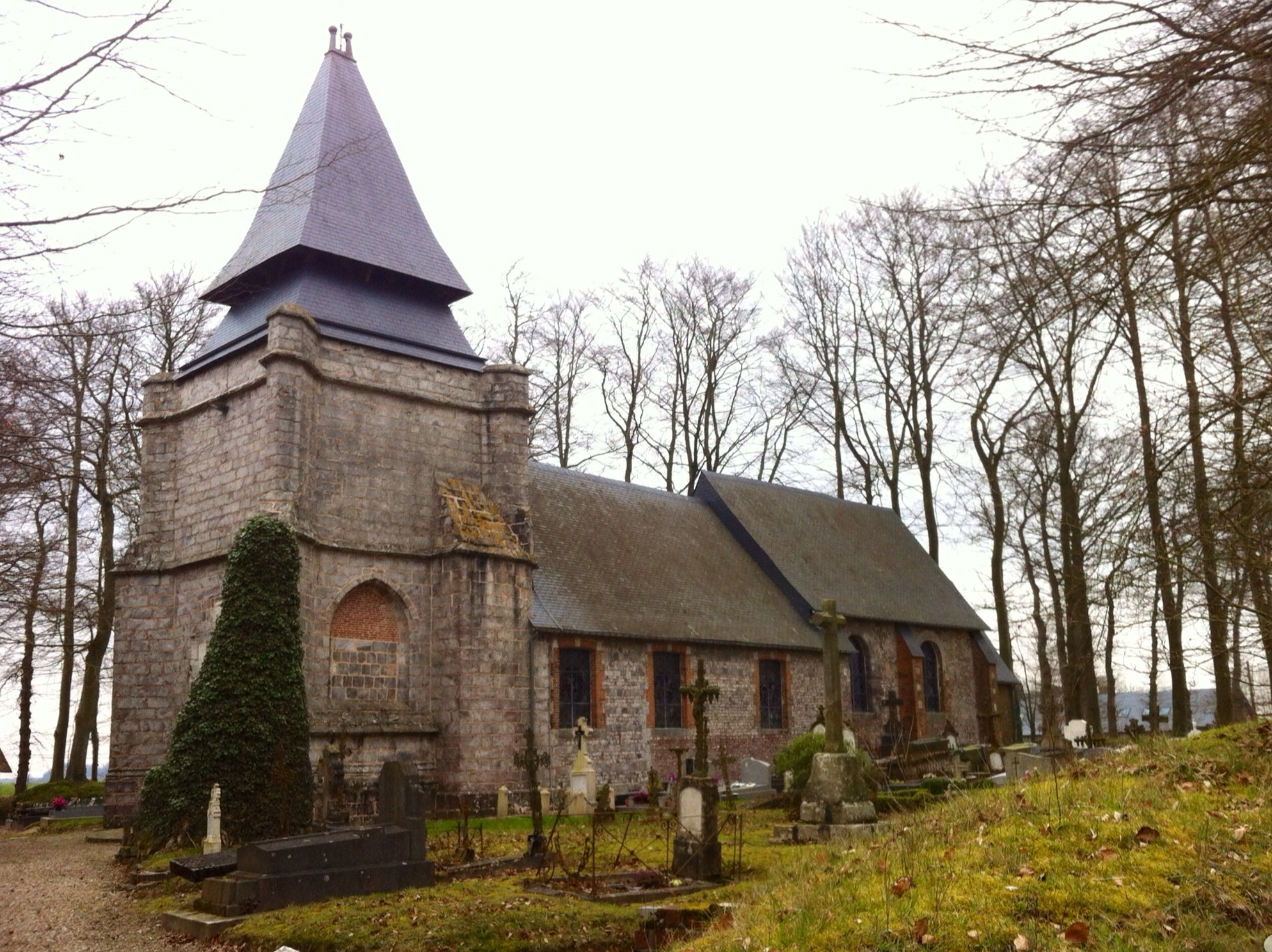 Commune de Gonzeville, église Saint-Samson